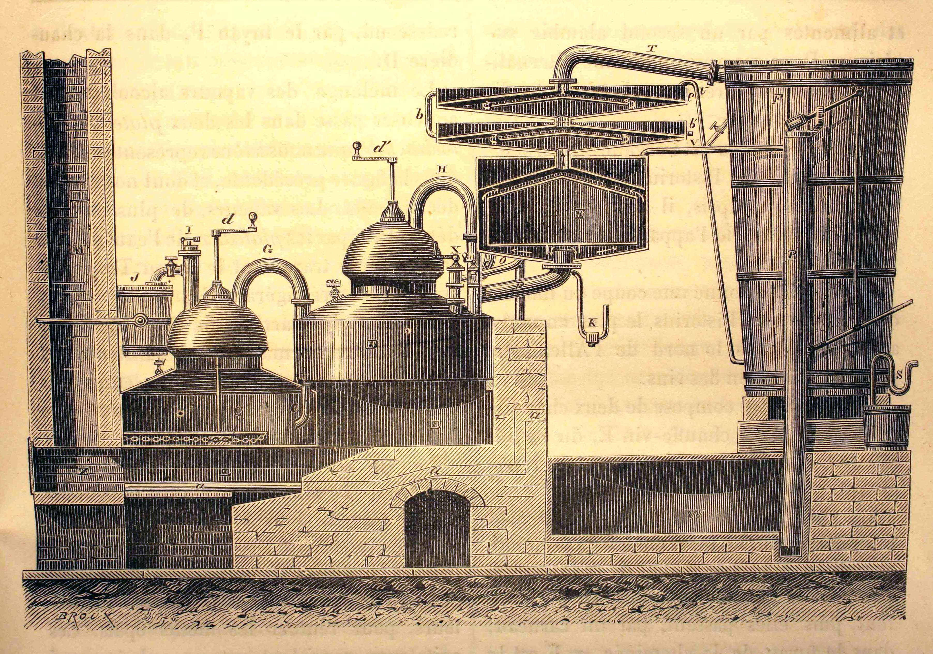 Schnitt durch einen Pistoriusapparat, Dephlegmator erfunden von Johann Heinrich Leberecht Pistorius, 1817